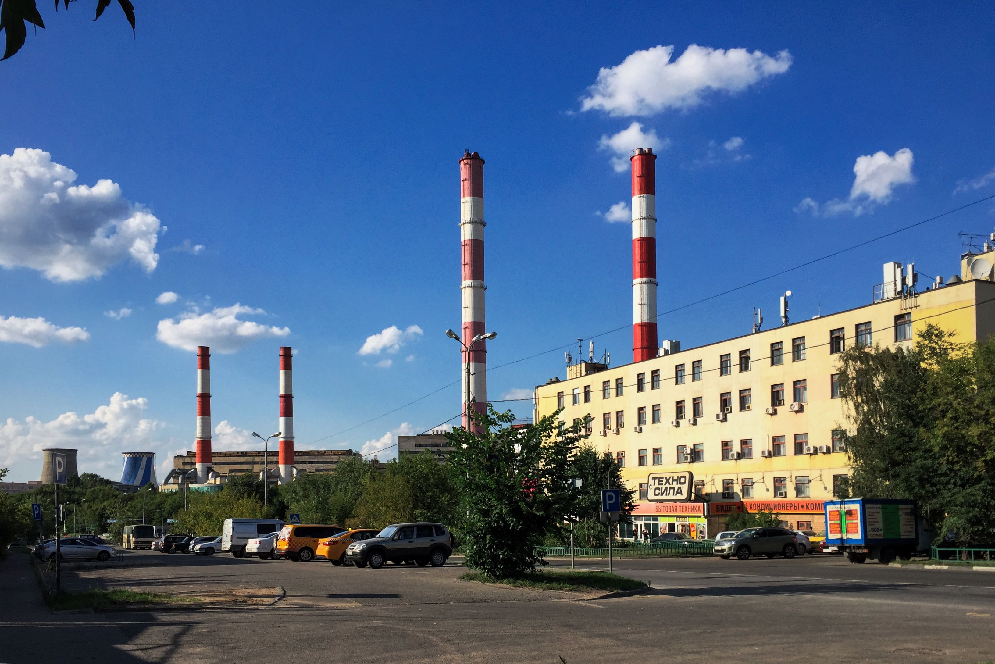 Монтажная улица, дом 7. Некогда, в 1990-е, легендарный магазин электроники "СВ". Затем фирма сменила название на "Техносила", начала расширяться, и в 2017 году обанкротилась.